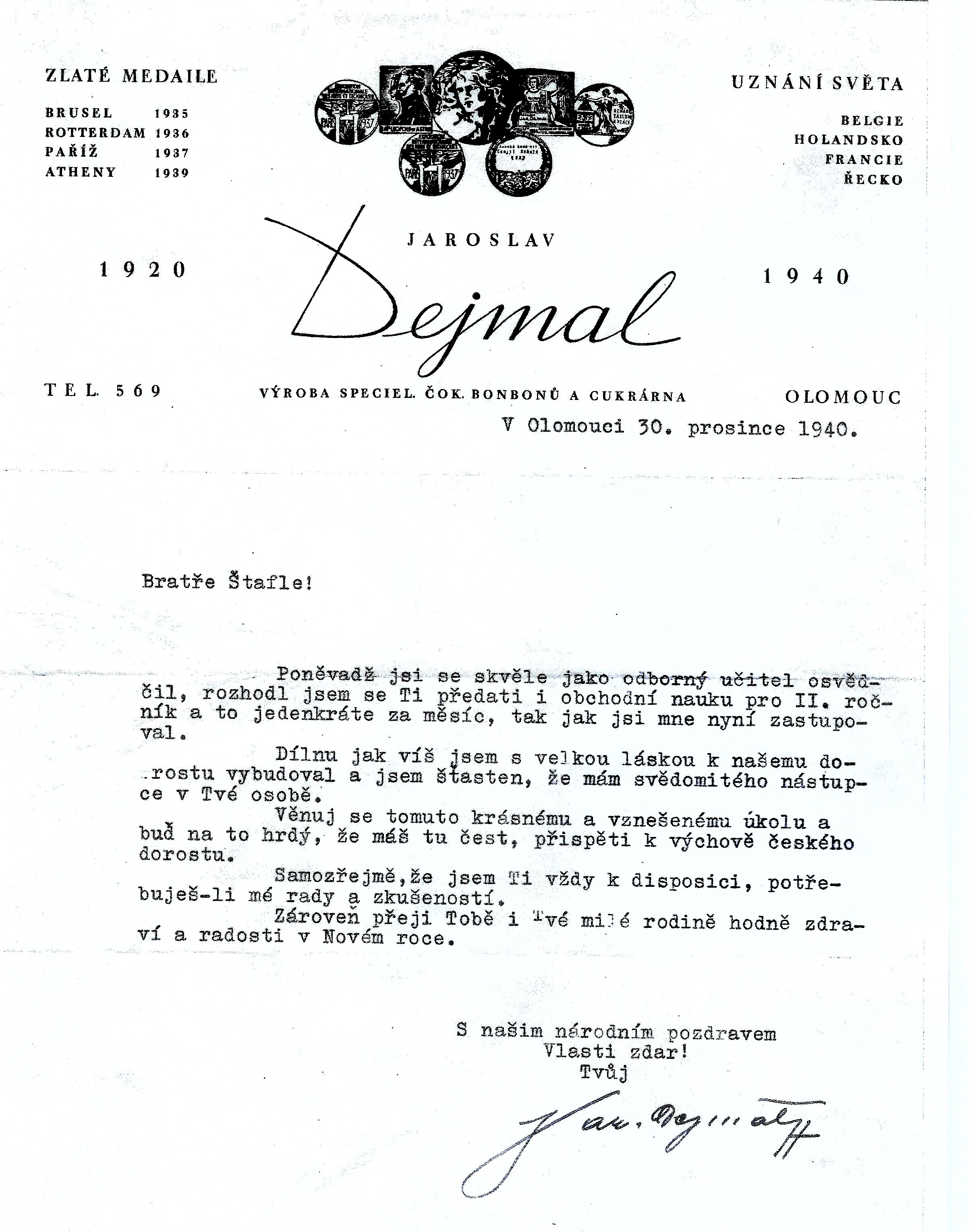 Josef Štafl odborný učitel - dopis od Jaroslava Dejmala 1940